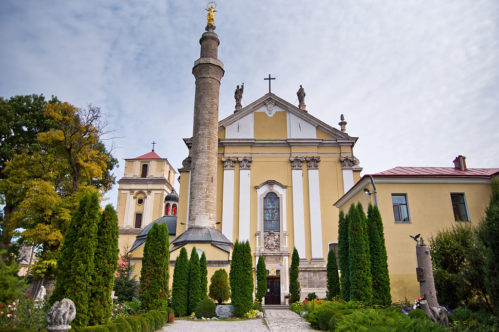 Костьол Св.Петра i Павла (кафедральний), Кам'янець-Подільський, вул.Татарська, 20